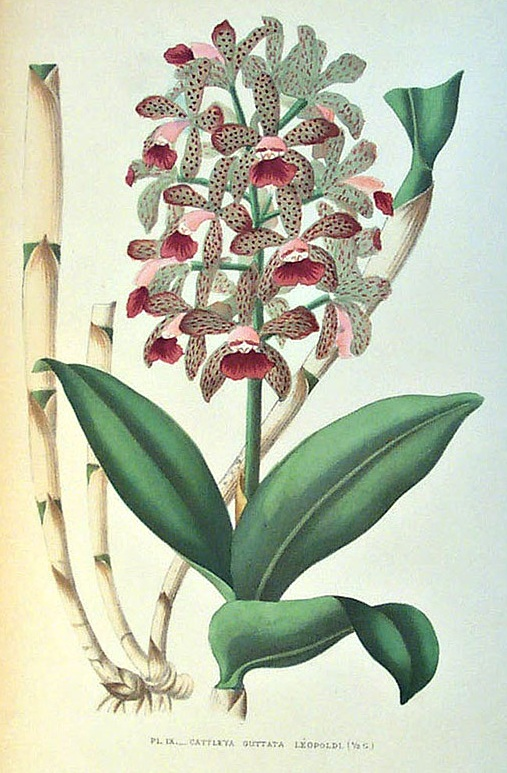 Cattleya guttata var. leopoldii, planche tirée de Les Orchidées, histoire iconographique, organographie, classification, géographie, collections, commerce, emploi, culture, avec une revue descriptive des espèces cultivées en Europe" par Paul-Émile de Puydt